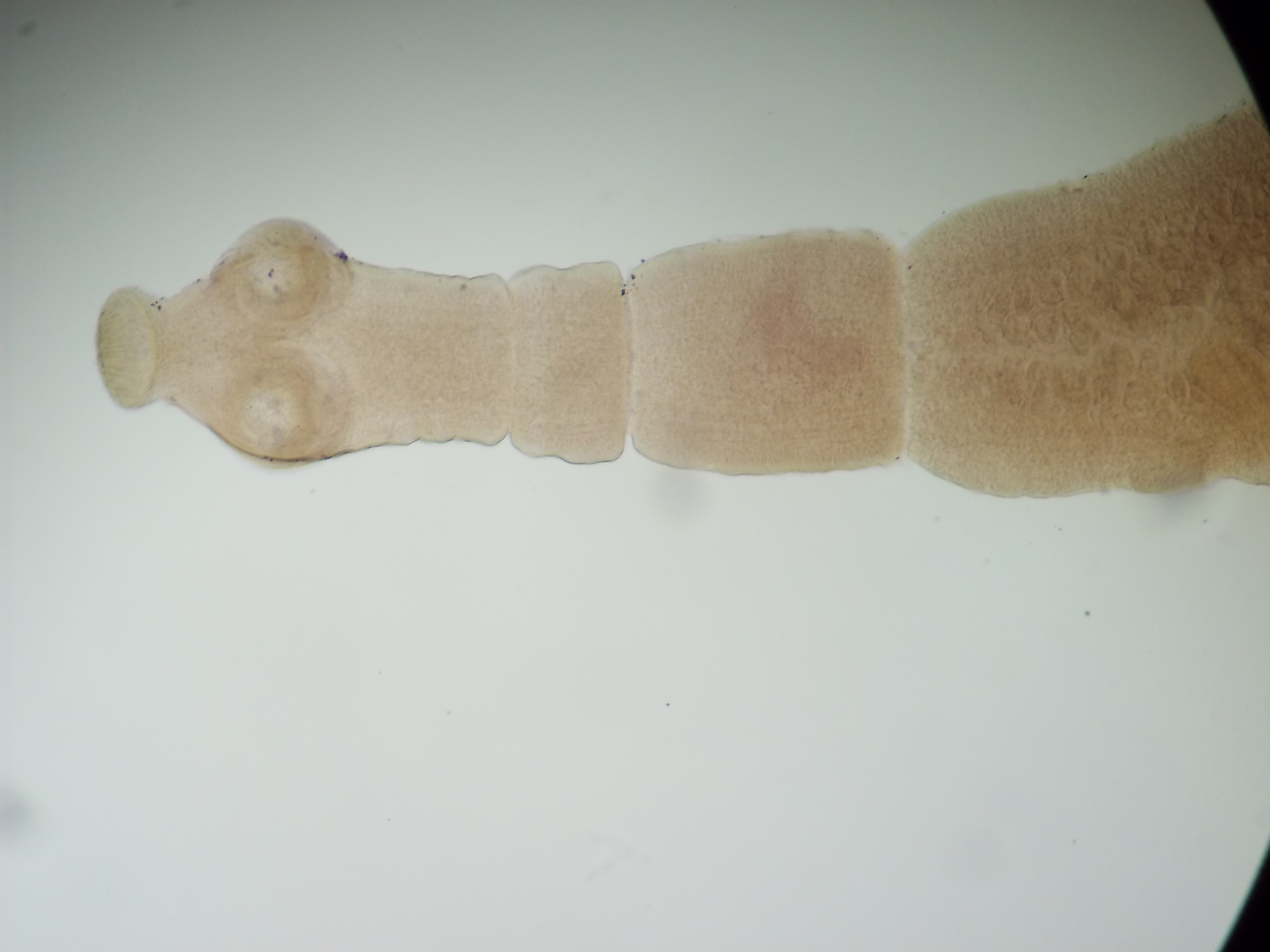 Echinococcus granulosus